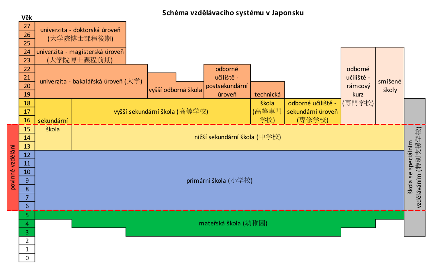 Zjednodušené grafické schéma vzdělávacího systému Japonska. Zpracováno na základě dat z portálu japonského Ministerstva školství, kultury, sportu, vědy a technologií